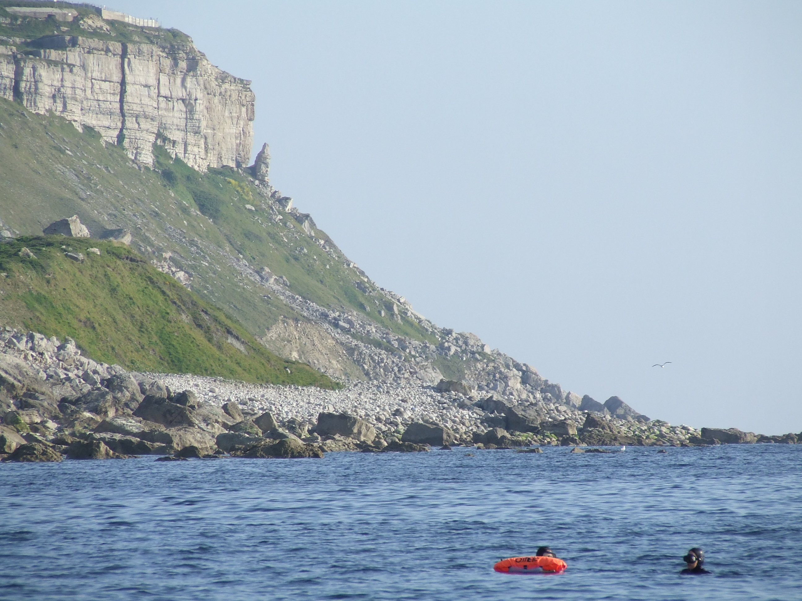 Chasse sous-marine